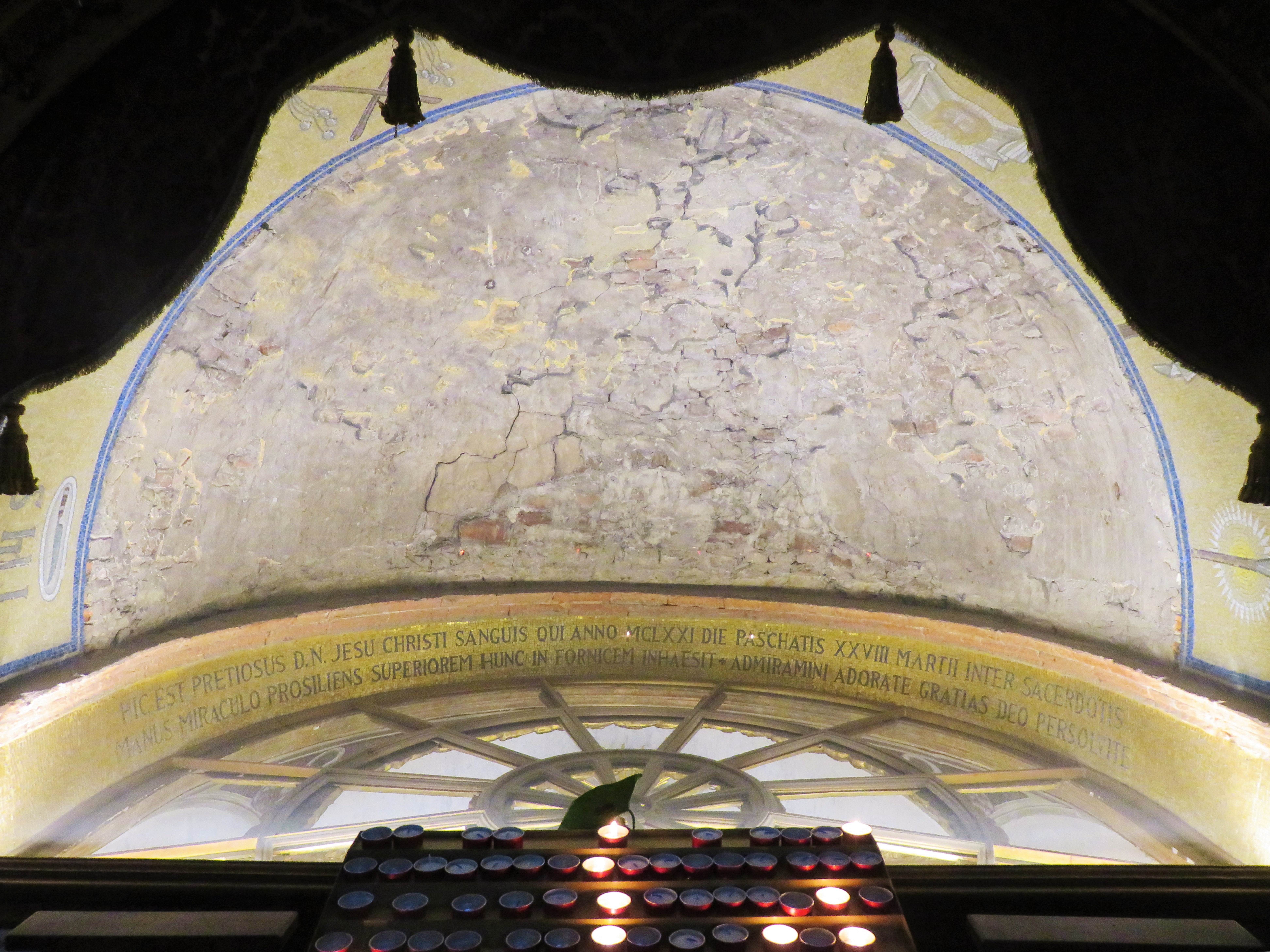 Piccola volta della chiesetta di Santa Maria Anteriore di Ferrara, ora distrutta. La volta è conservata nella chiesa di Santa Maria in Vado. Mantiene i segni del miracolo eucaristico che secondo la tradizione è avvenuto il 28 marzo 1171